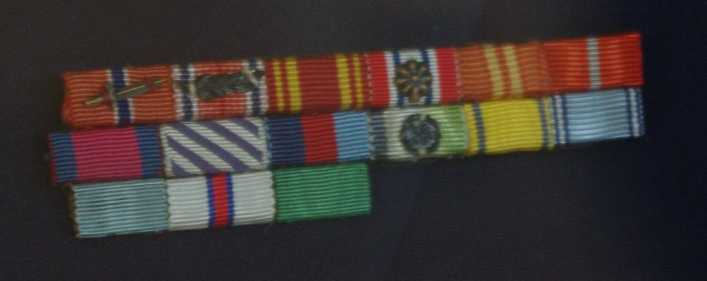 Norsk ordensbånd